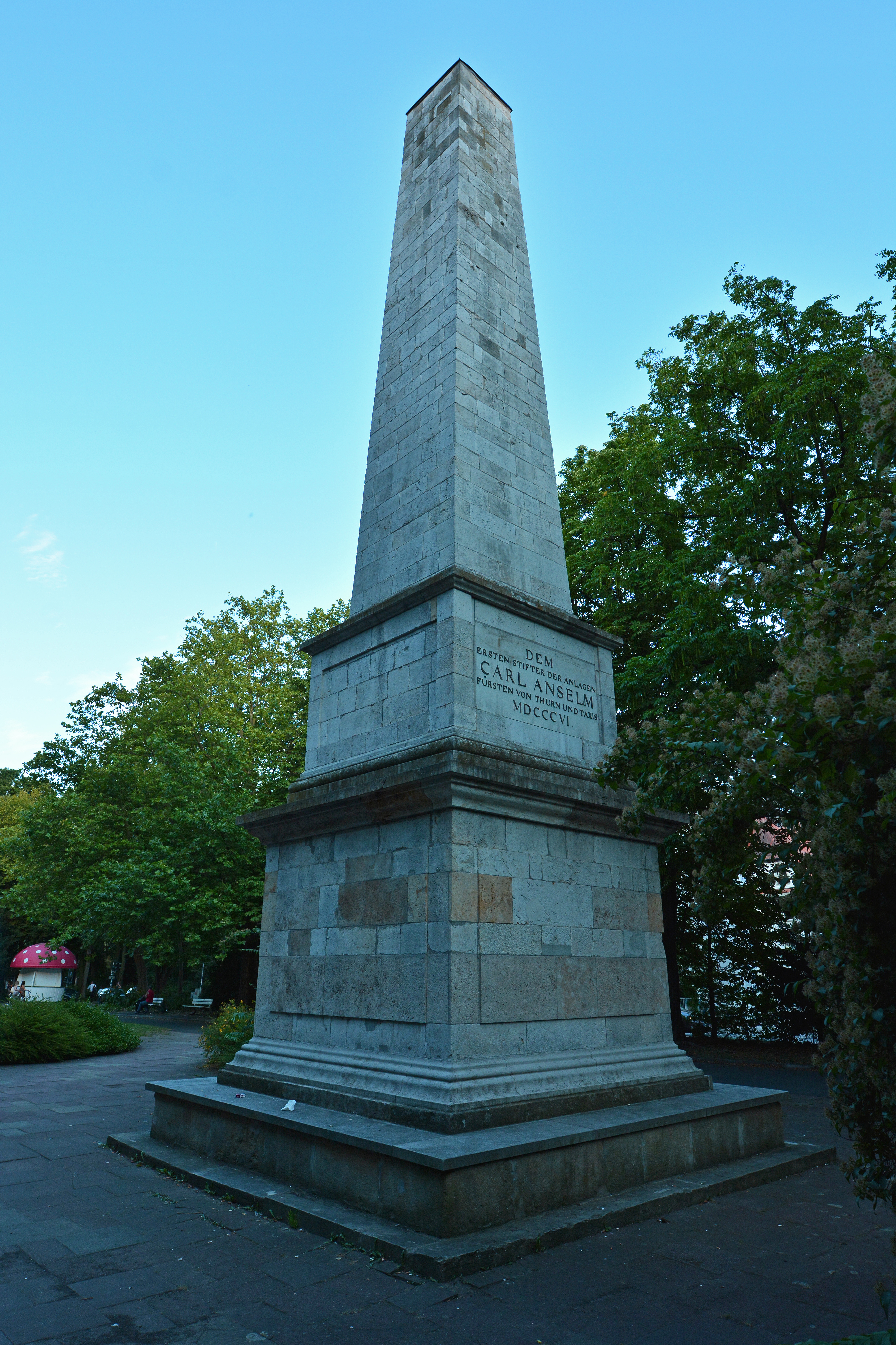 Der klassizistische Kalkstein-Obelisk für Karl Anselm Fürst von Thurn und Taxis wurde 1806 von Emanuel d`Herigoyen geschaffen. Er steht auf der 1779-81 an der Stelle der einstigen Stadtbefestigung angelegten Fürst-Anselm-Allee, einem Teil des heutigen Alleengürtels, der die Regensburger Altstadt umgibt. D-3-62-000-455This is a photograph of an architectural monument.